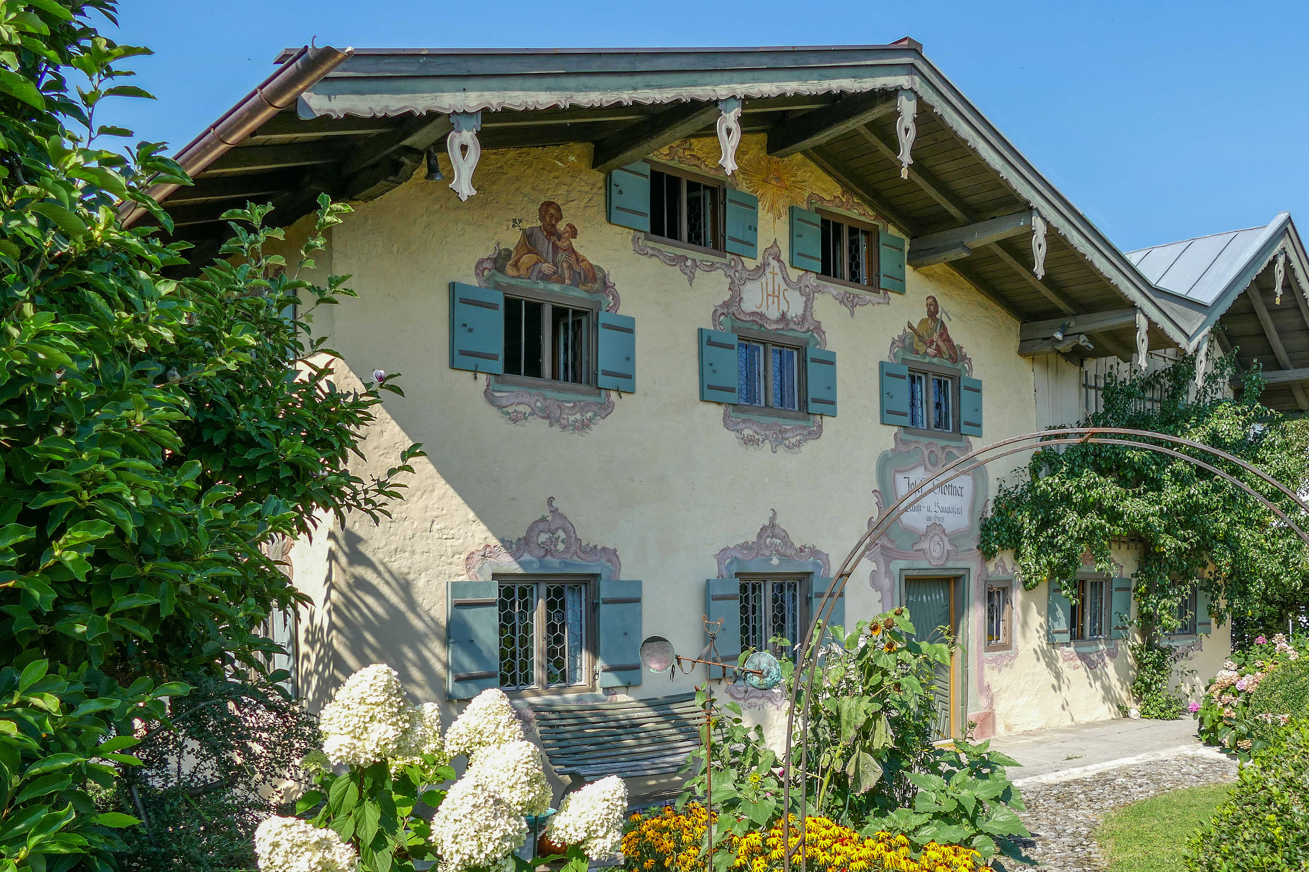 Das Stettnerhaus in Prien am Chiemsee im Ortsteil "Am Gries"